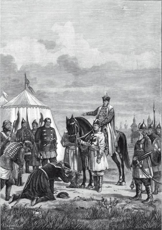 Болотников сдаётся Шуйскому